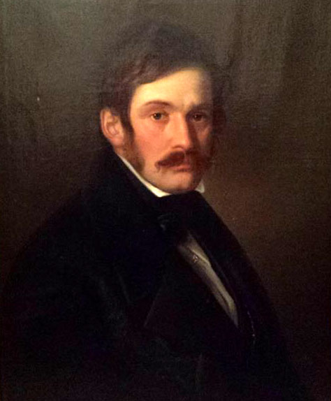 Portrait Friedrich von Amerling von Johann Jacob Mezler (Maler)